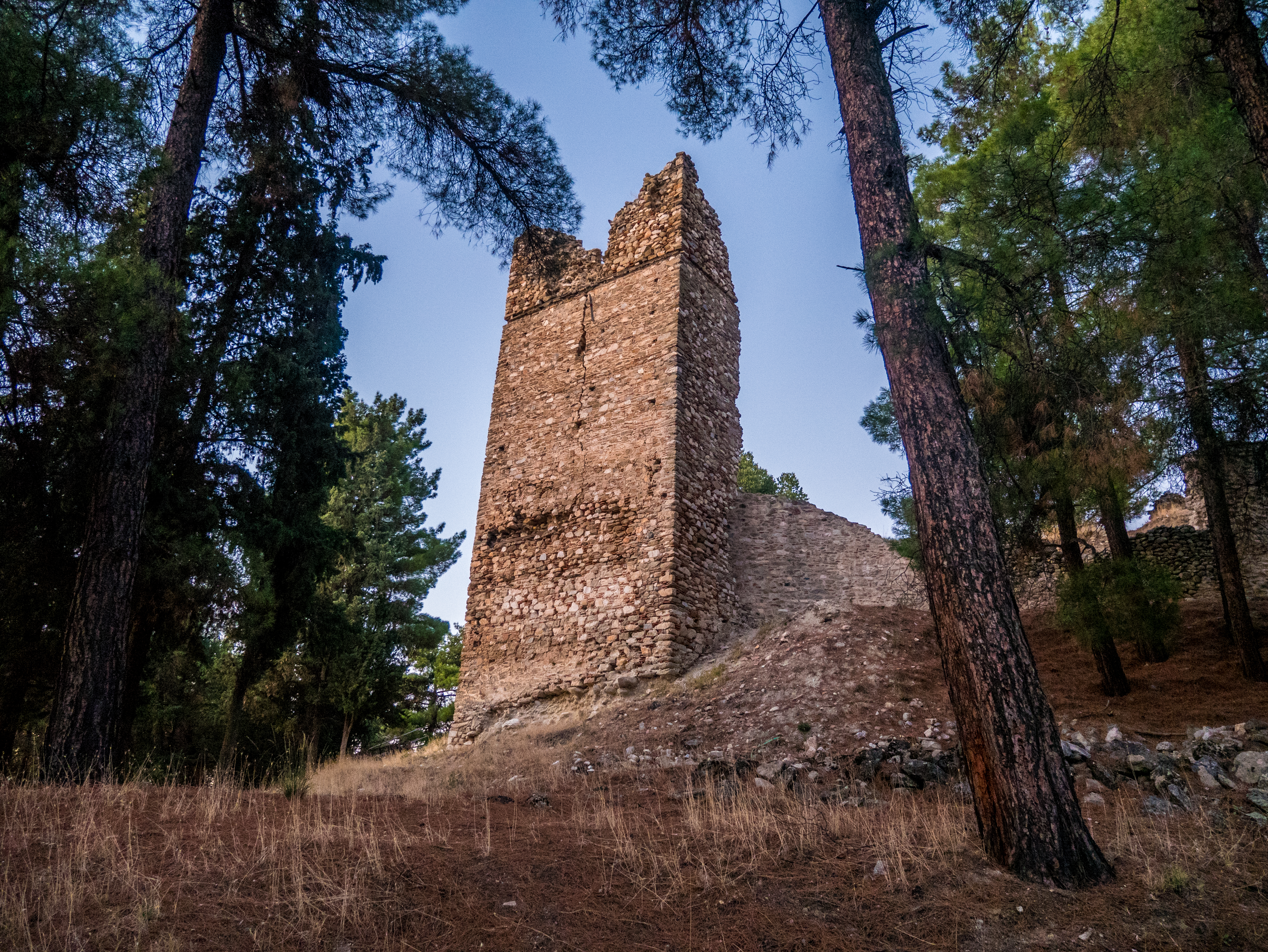 Βυζαντινό κάστρο Σερβίων«Βυζαντινό κάστρο Σερβίων»